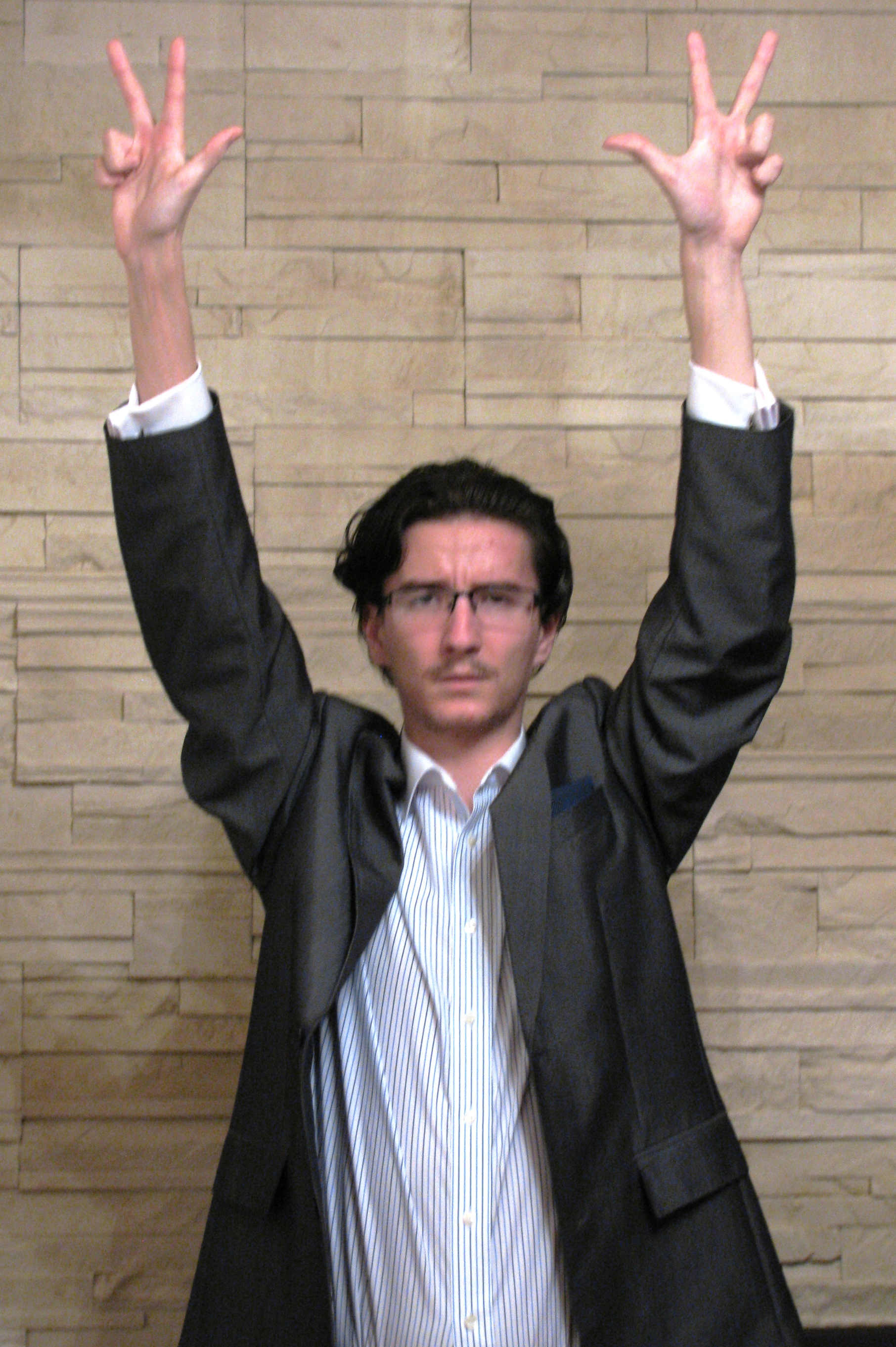 Celny rzut za 3 punkty